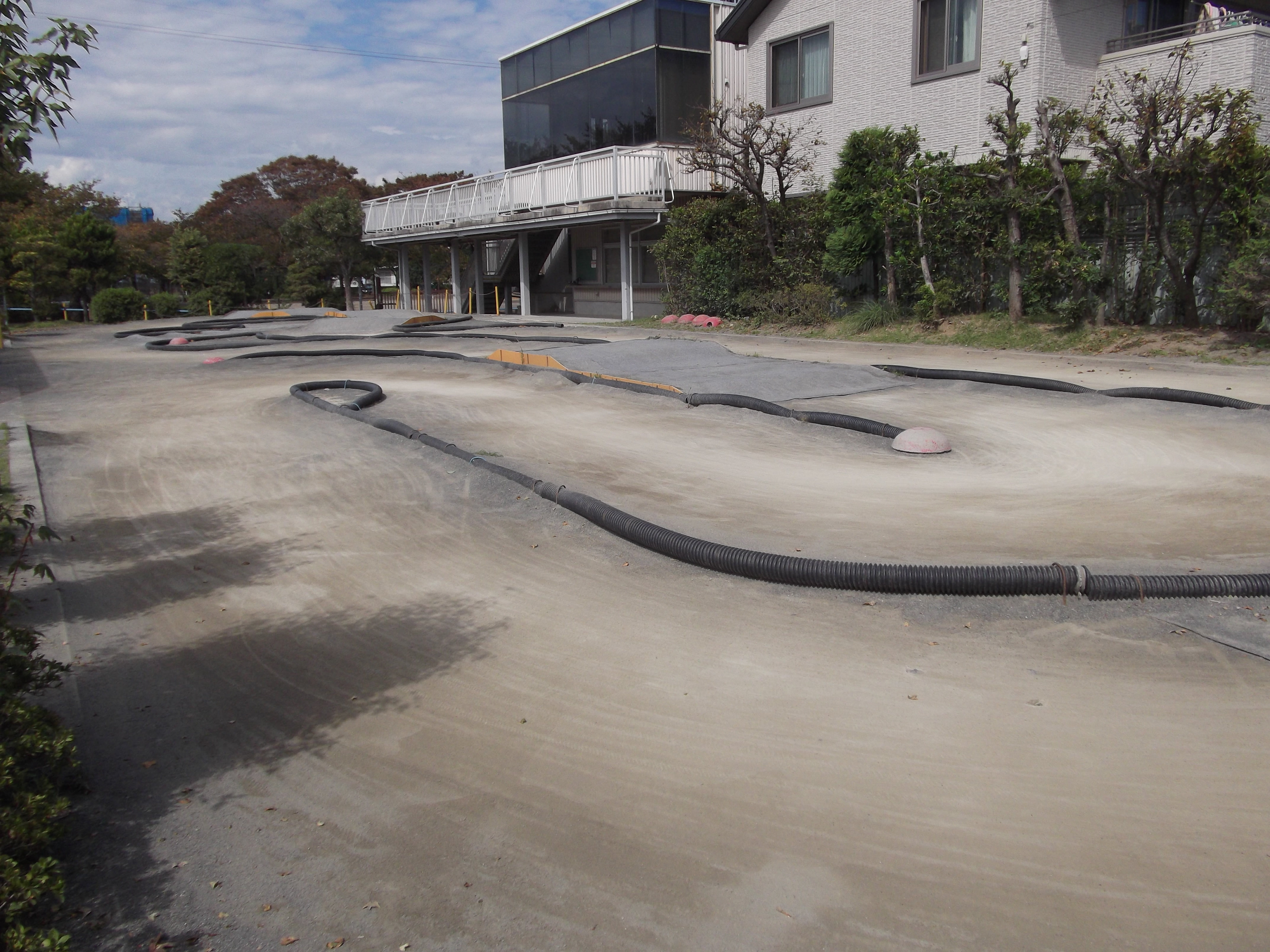 静岡県静岡市駿河区池田にあるタミヤサーキットのオフロードコース